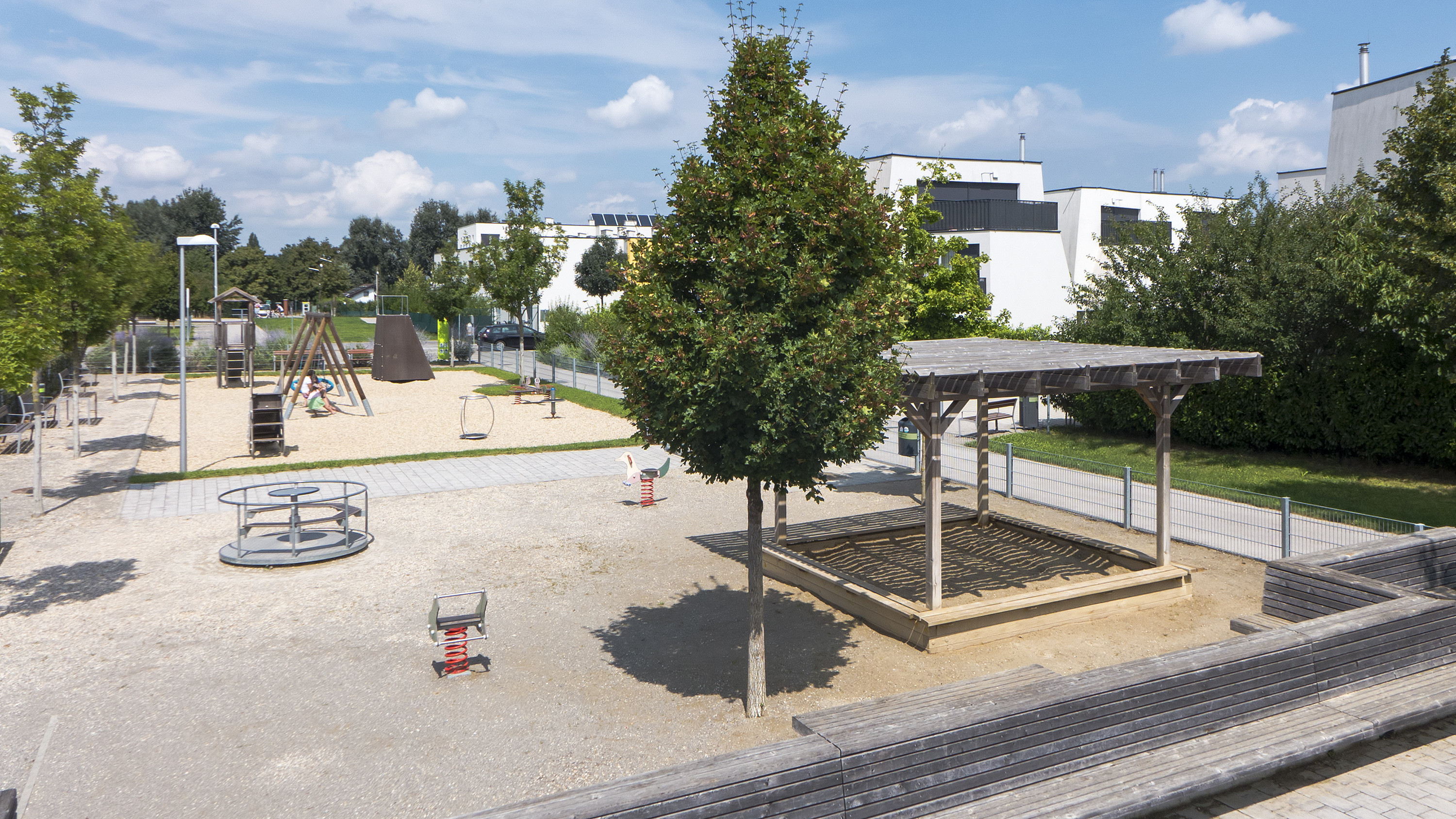 Lumbyepark in Wien 22